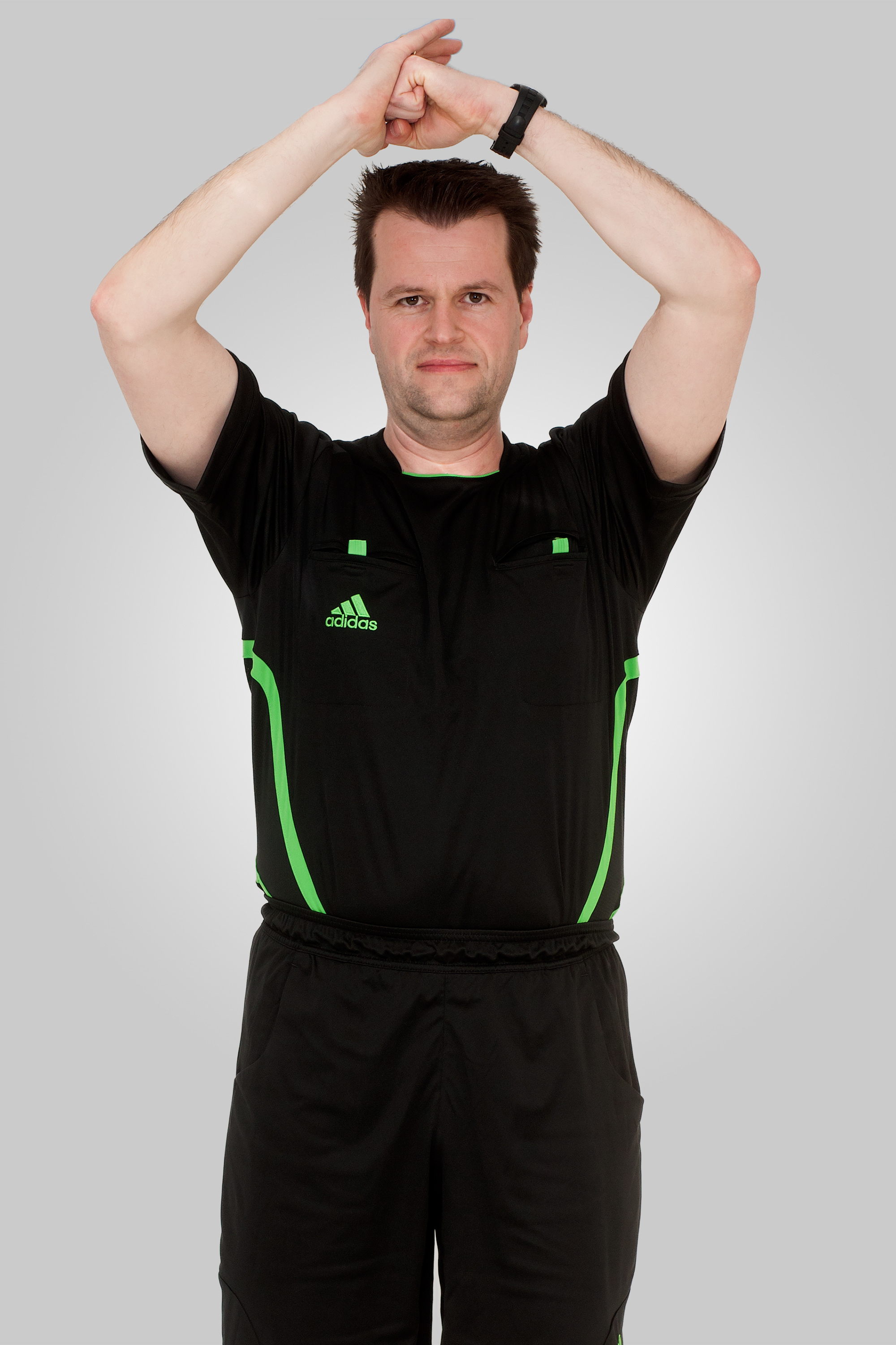 Internationale Handballregeln Handzeichen 06 Stürmerfoul